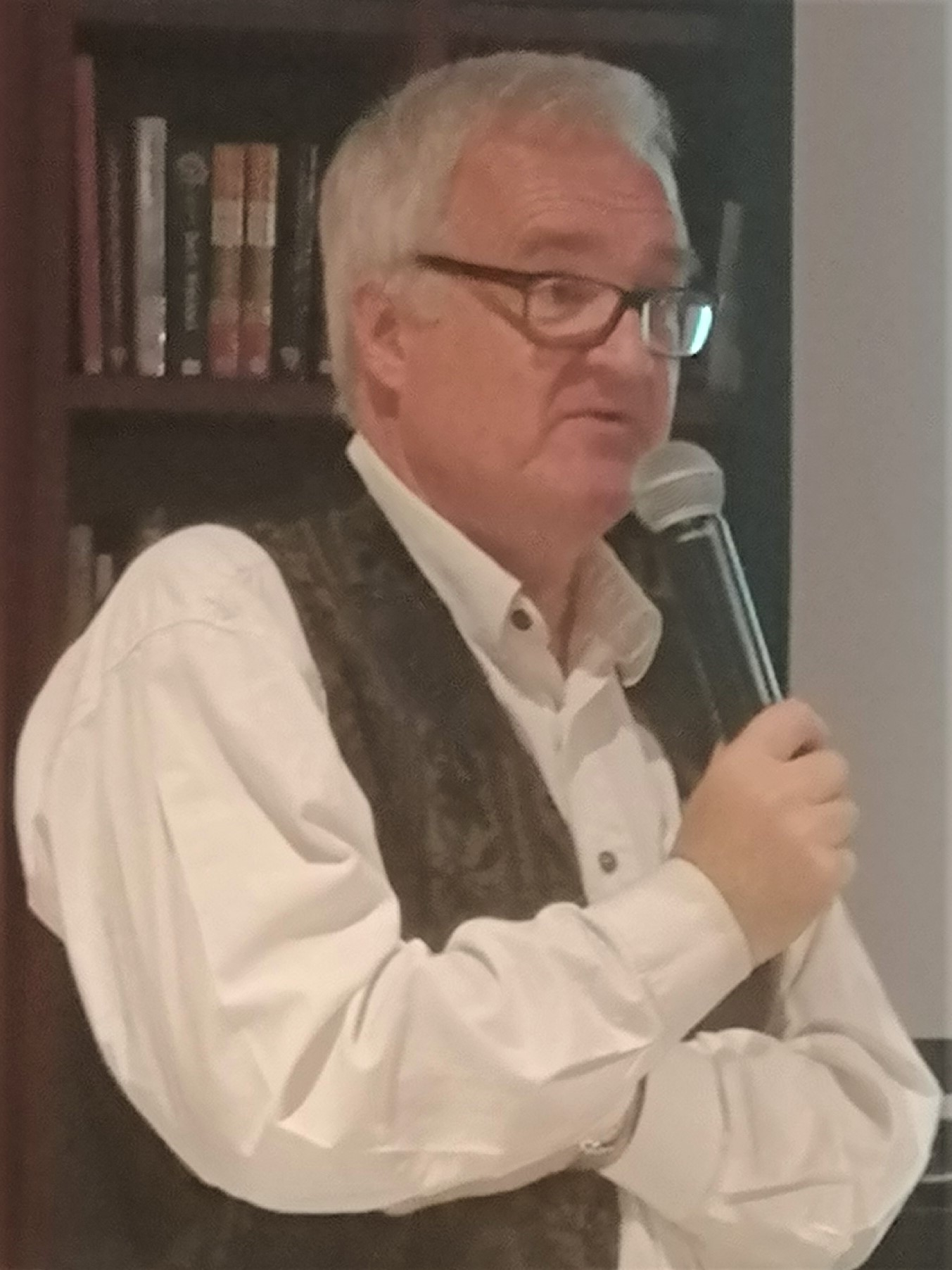 Ted Johan Rosvall, född 1952